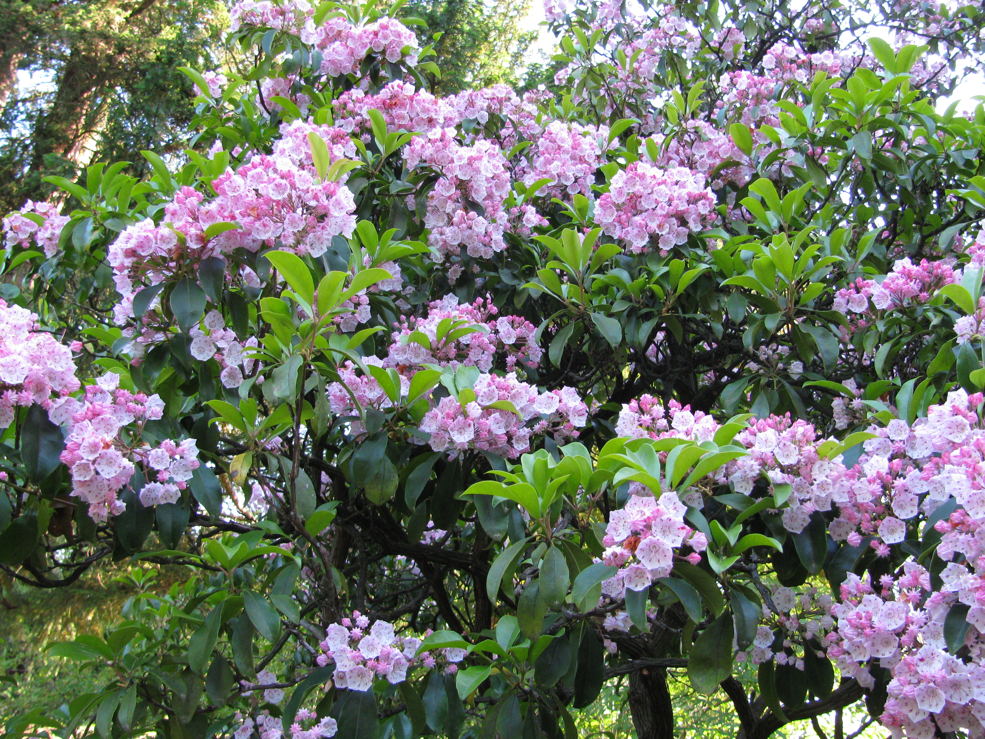 Rhododendronpark Rathen